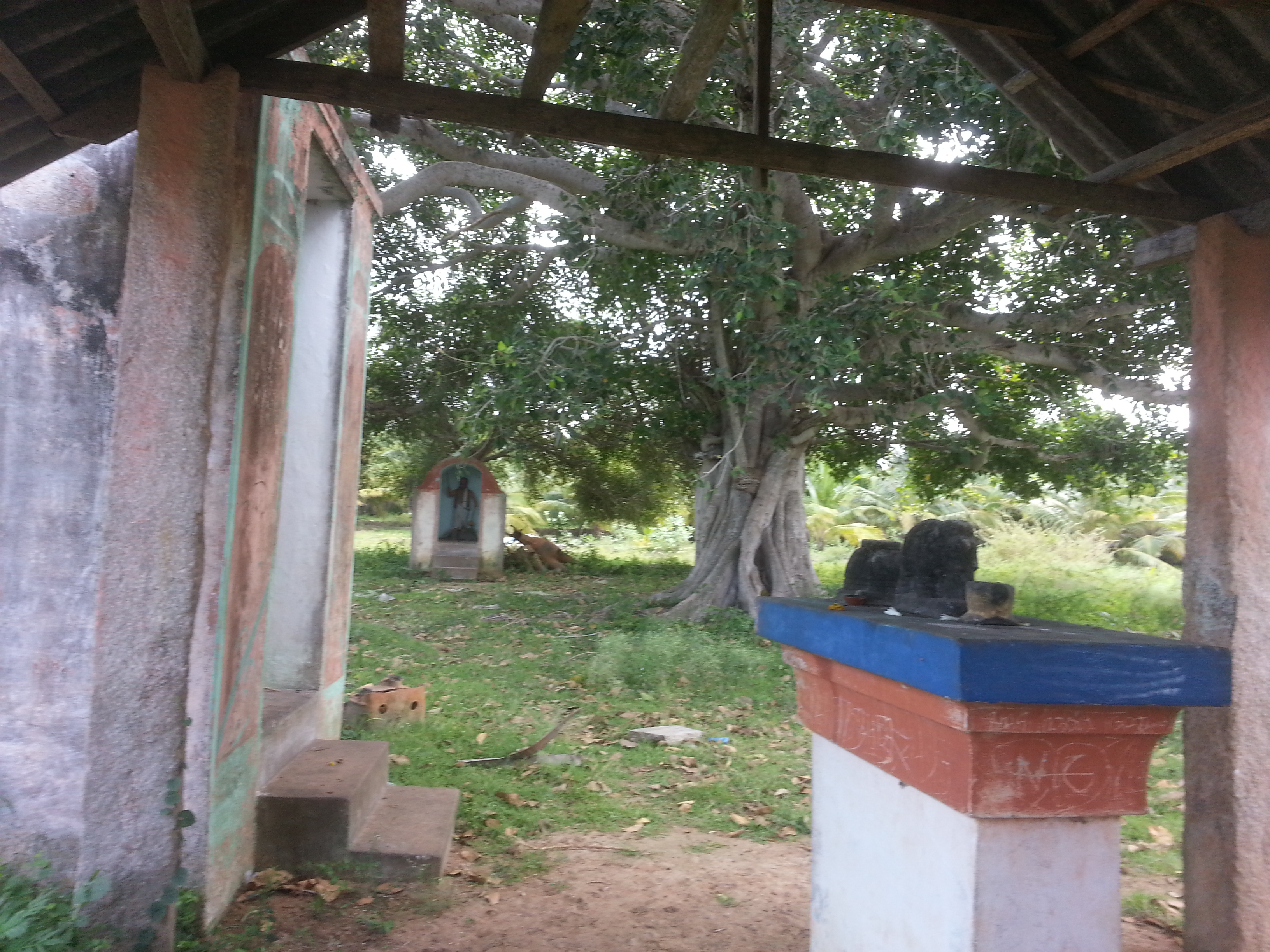 முடச்சிக்காடு அம்மையப்ப அய்யனார் ஆலயம்